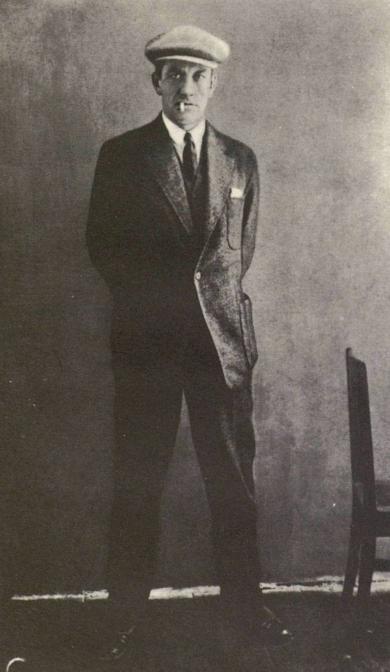 Маяковский, Владимир Владимирович